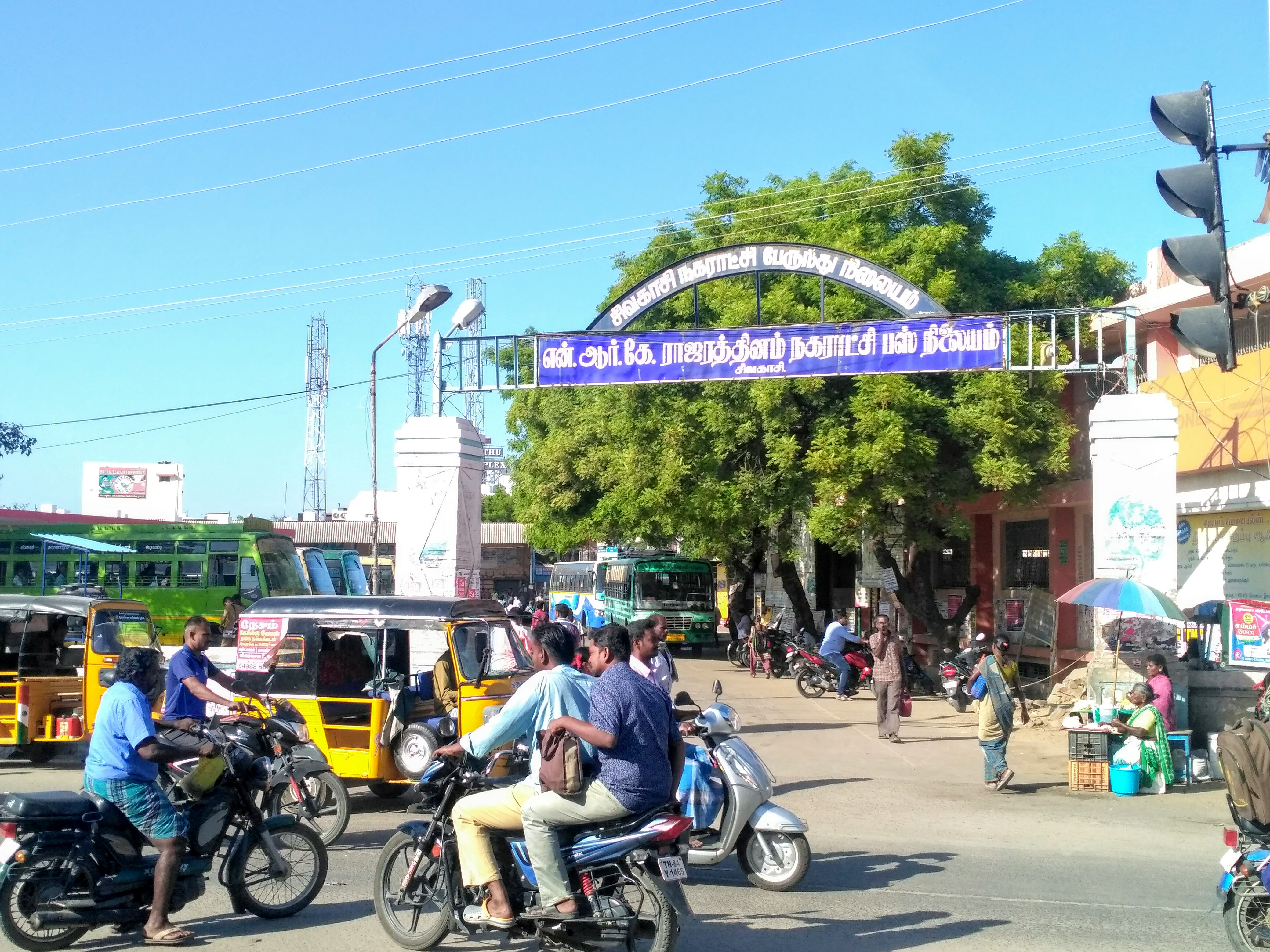 சிவகாசி பேருந்து நிலையம்..